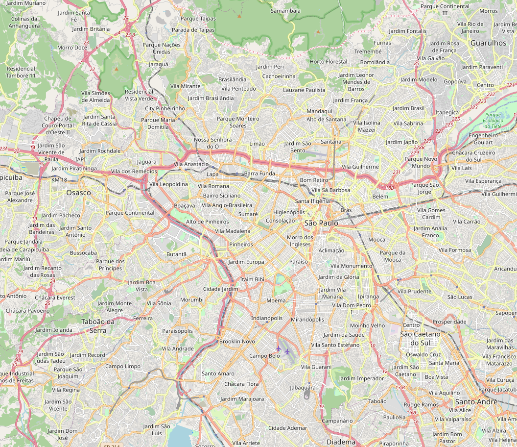 Mapa da cidade de São Paulo, Brasil. This map may be incomplete, and may contain errors. Don't rely solely on it for navigation.